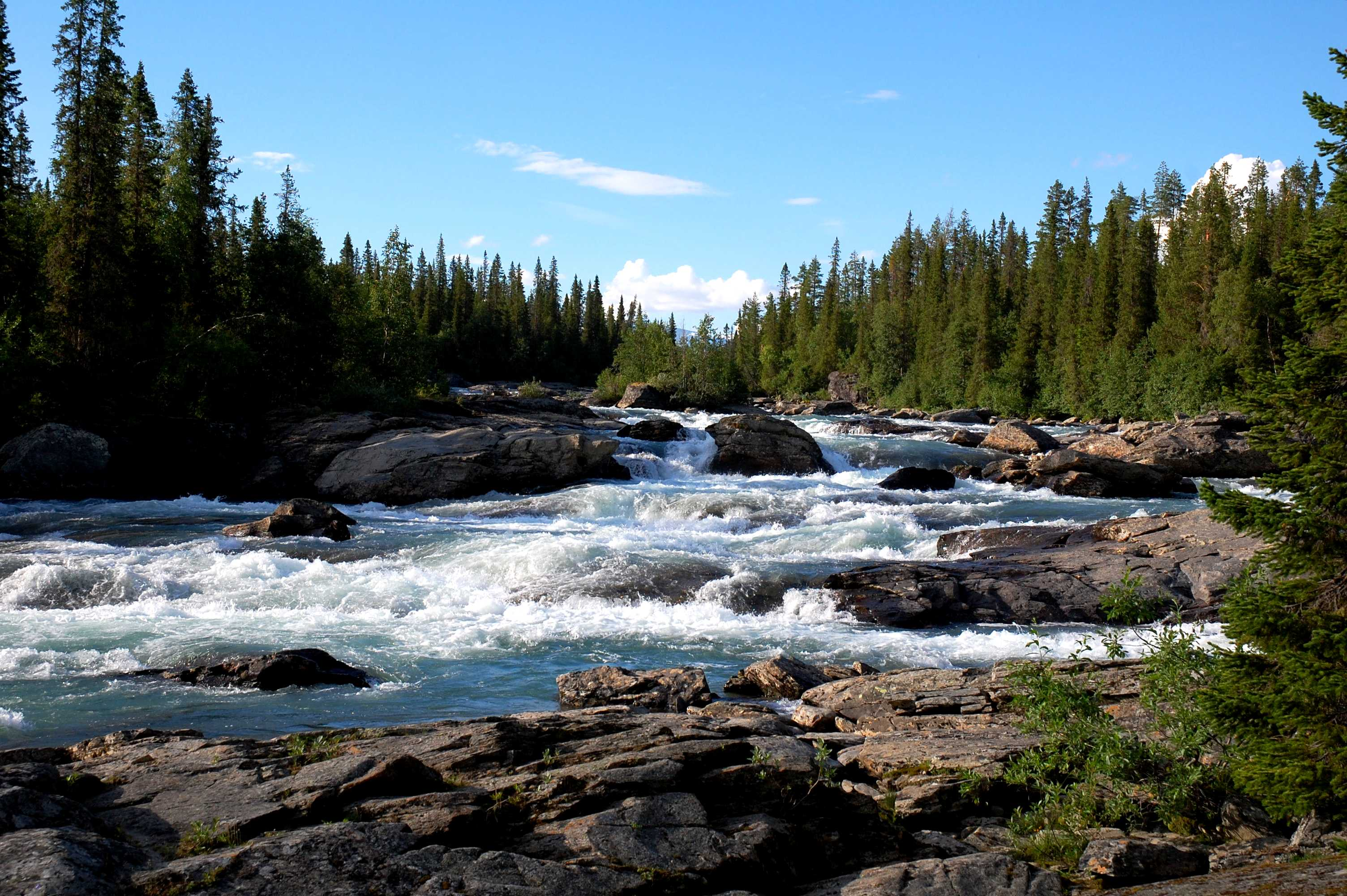 Kamajokk in Kvikkjokk